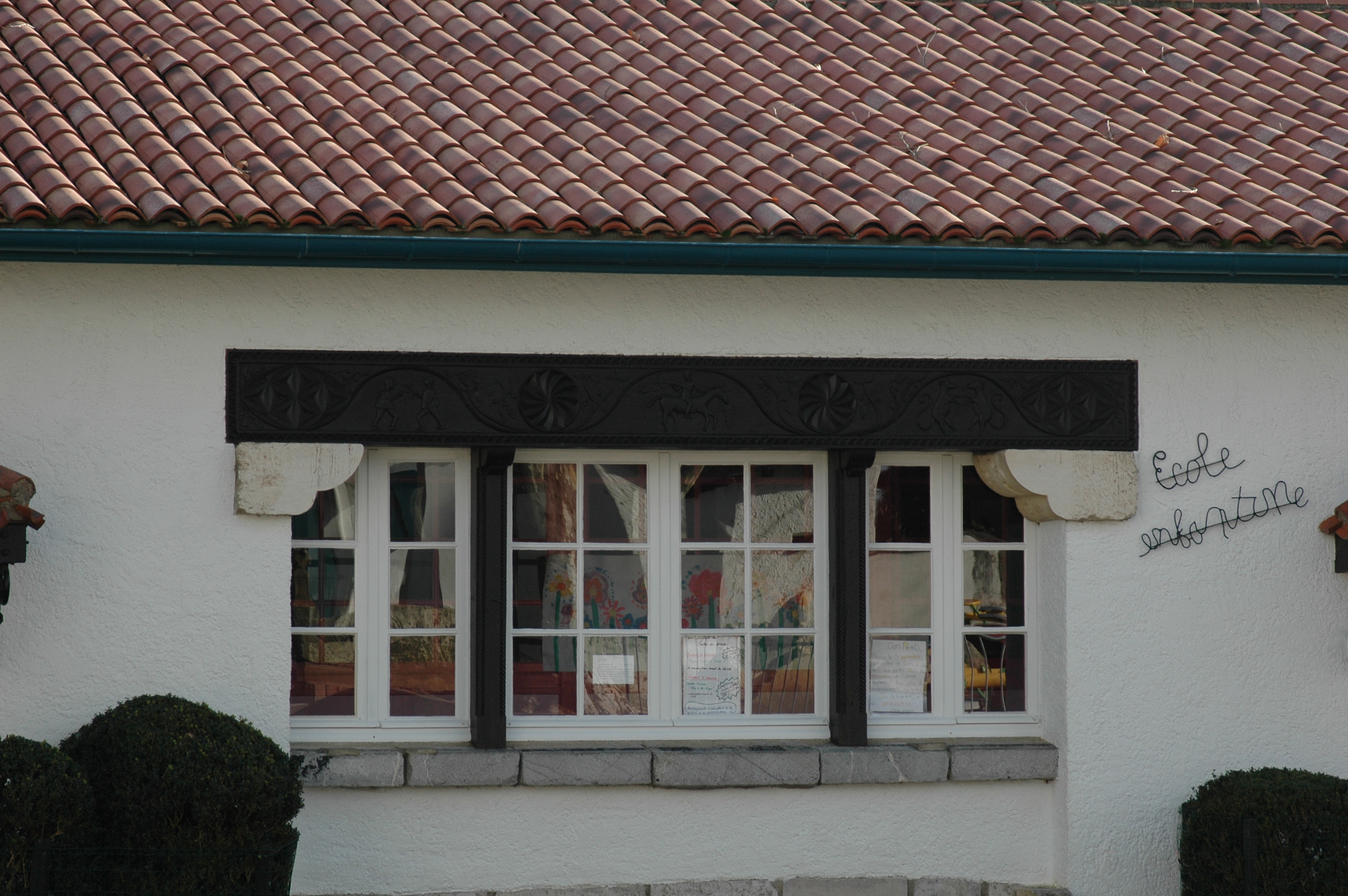 Ecole d'Arcangues